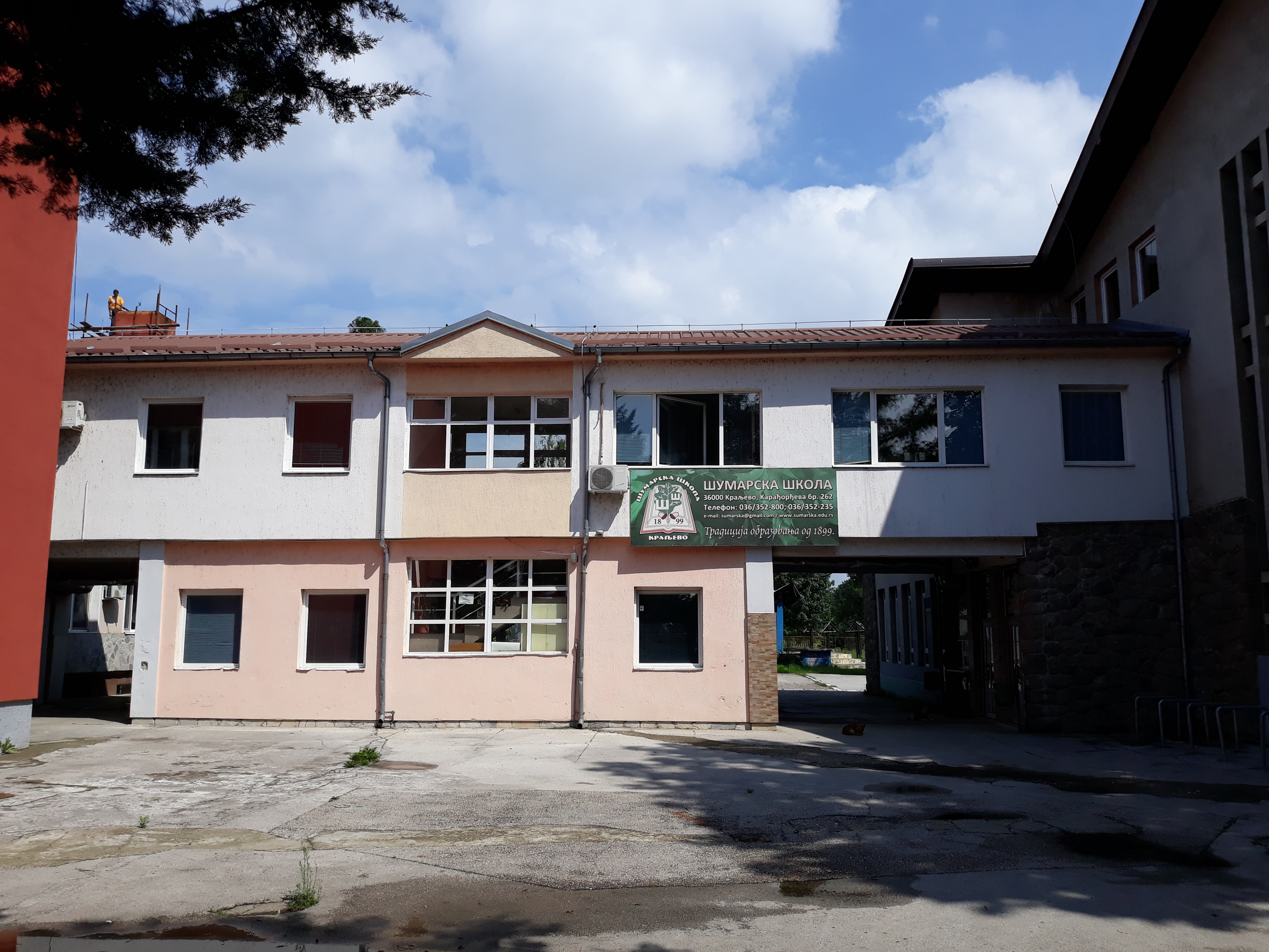 Шумарска школа Краљево